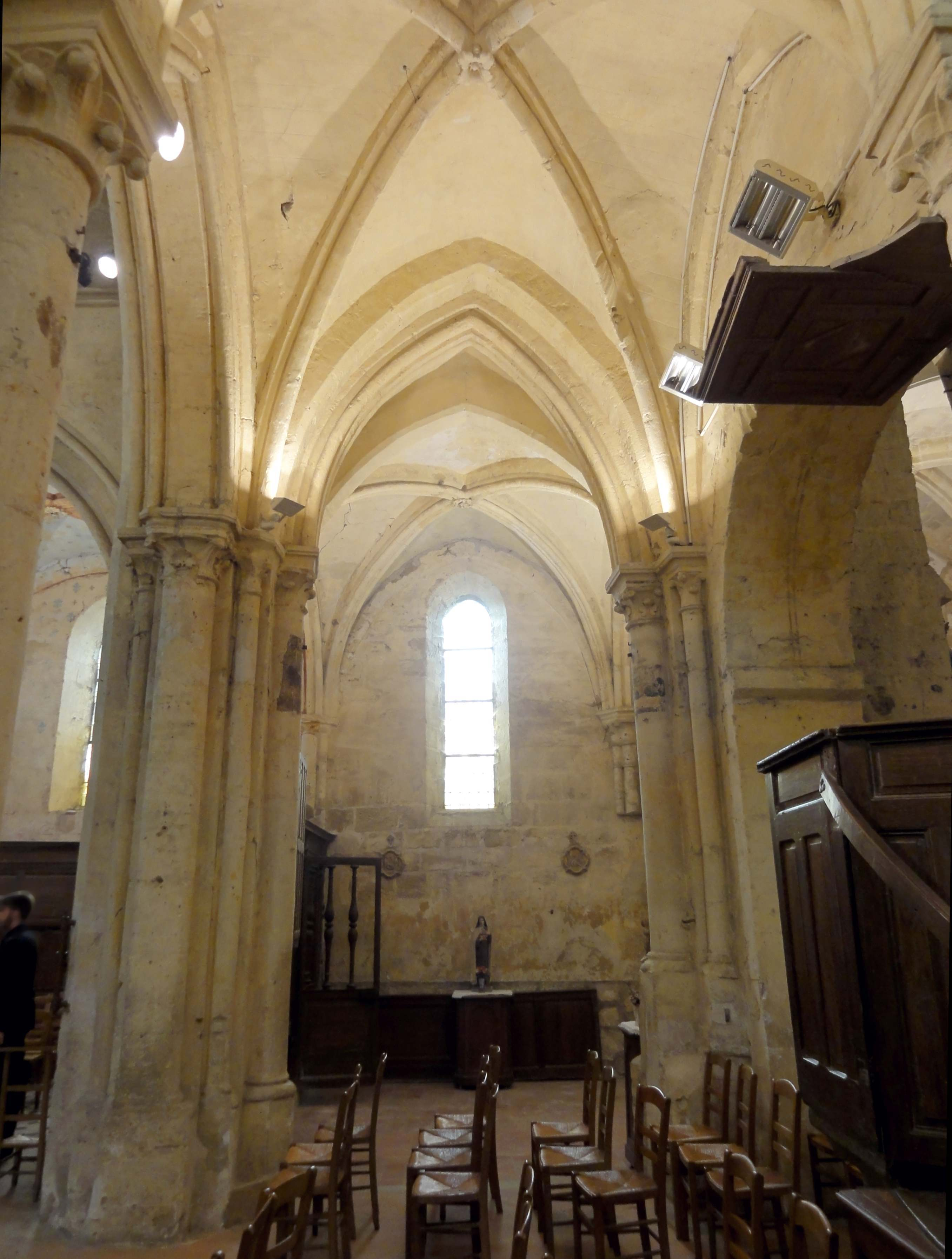 Intérieur de l'église (voir titre).